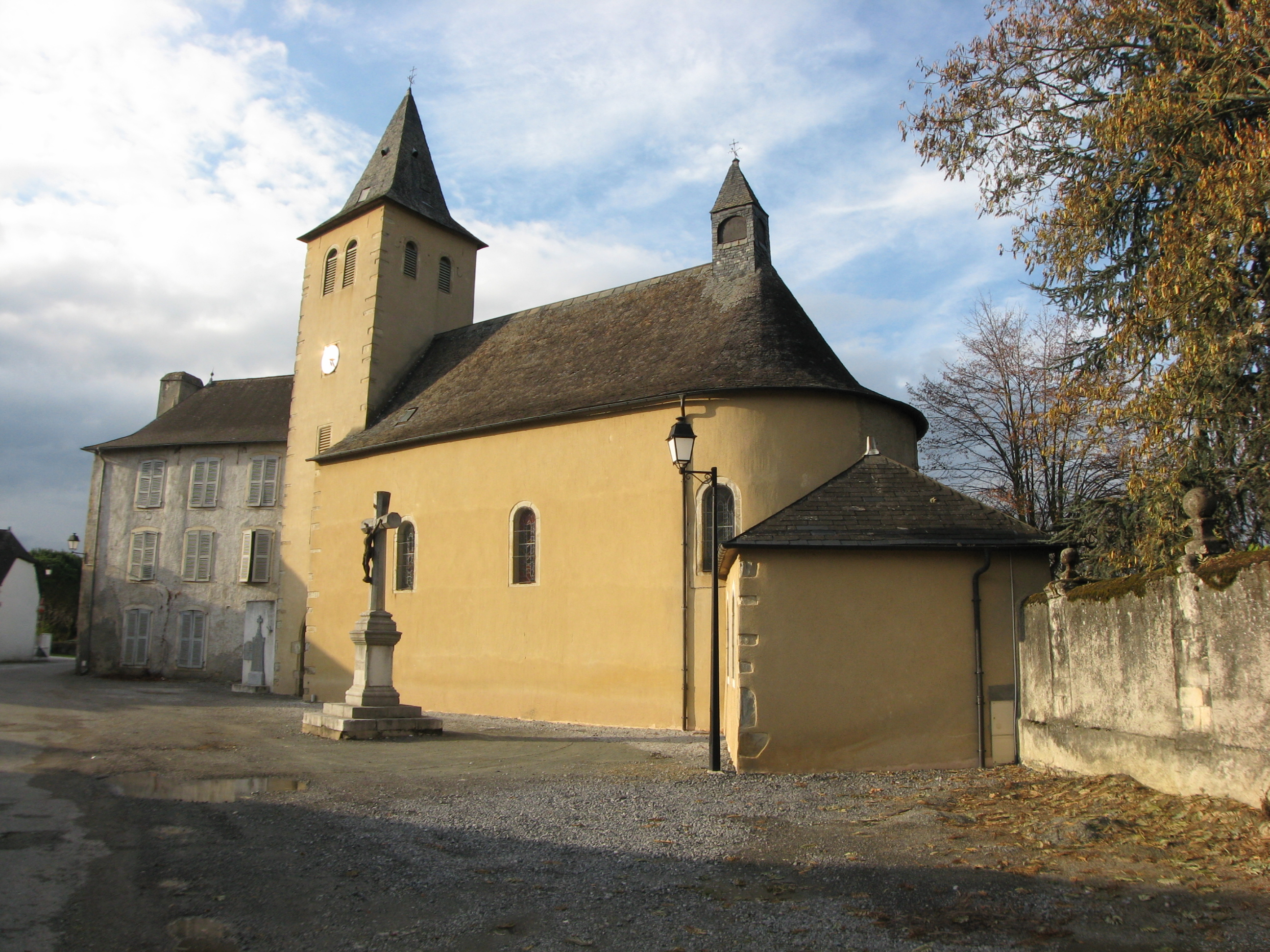 Eglise d'Orin (Pyrénées-Atlantiques) (Pyrénées).